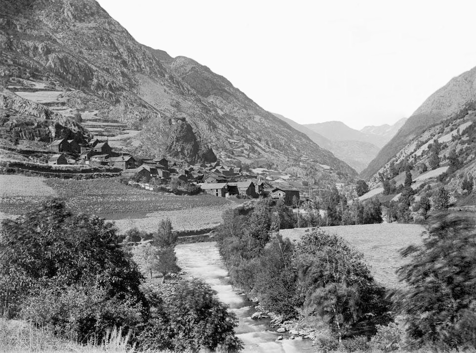 Imatge